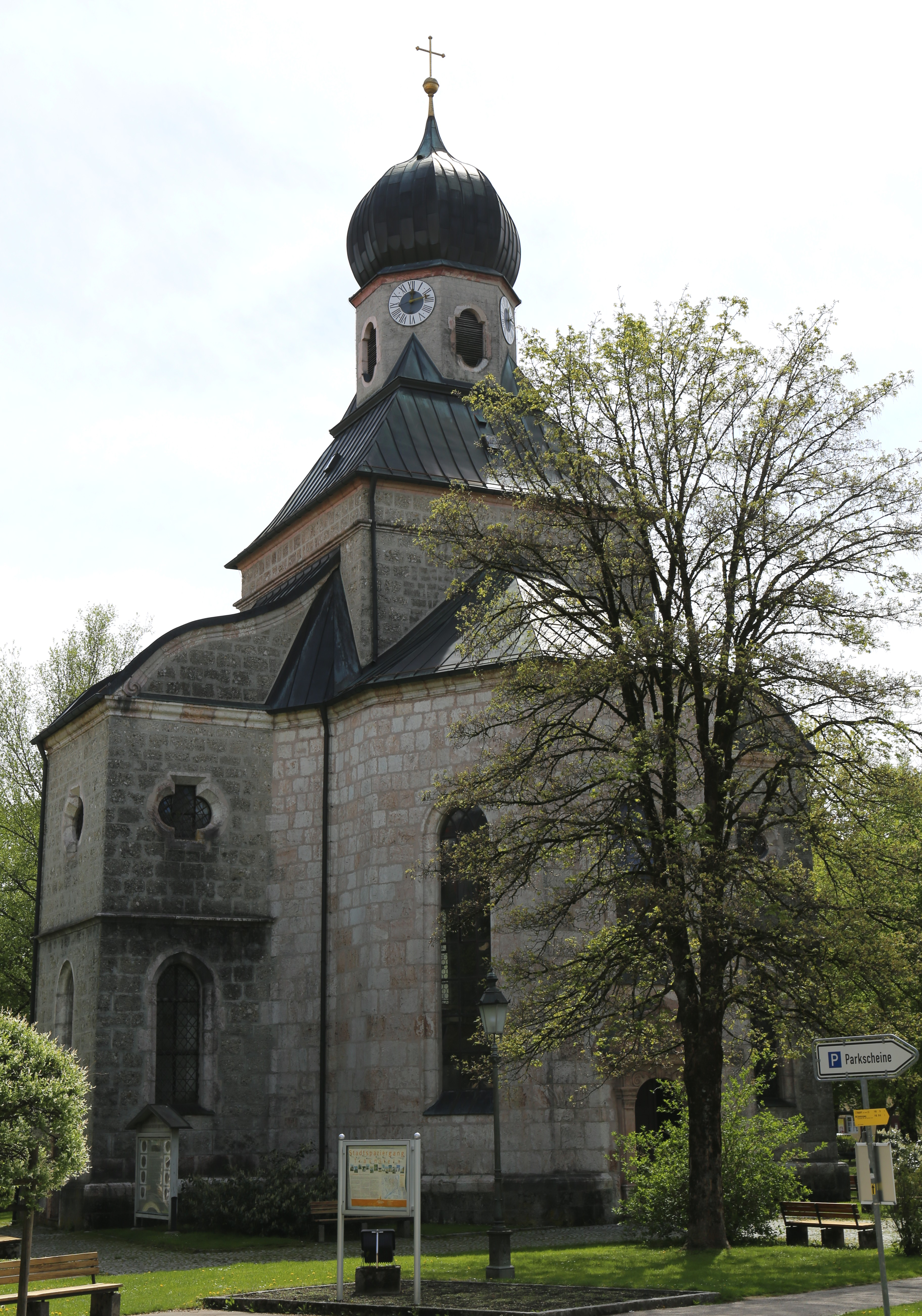 Karl-Theodor-Platz 1, Traunstein; St. Rupert und Maximilian, Katholische Salinenkapelle, kreuzförmiger Bau mit Turm über dem quadratischen Mittelraum, nach Plänen von Isaak Bader durch Wolf König errichtet, 1630/31